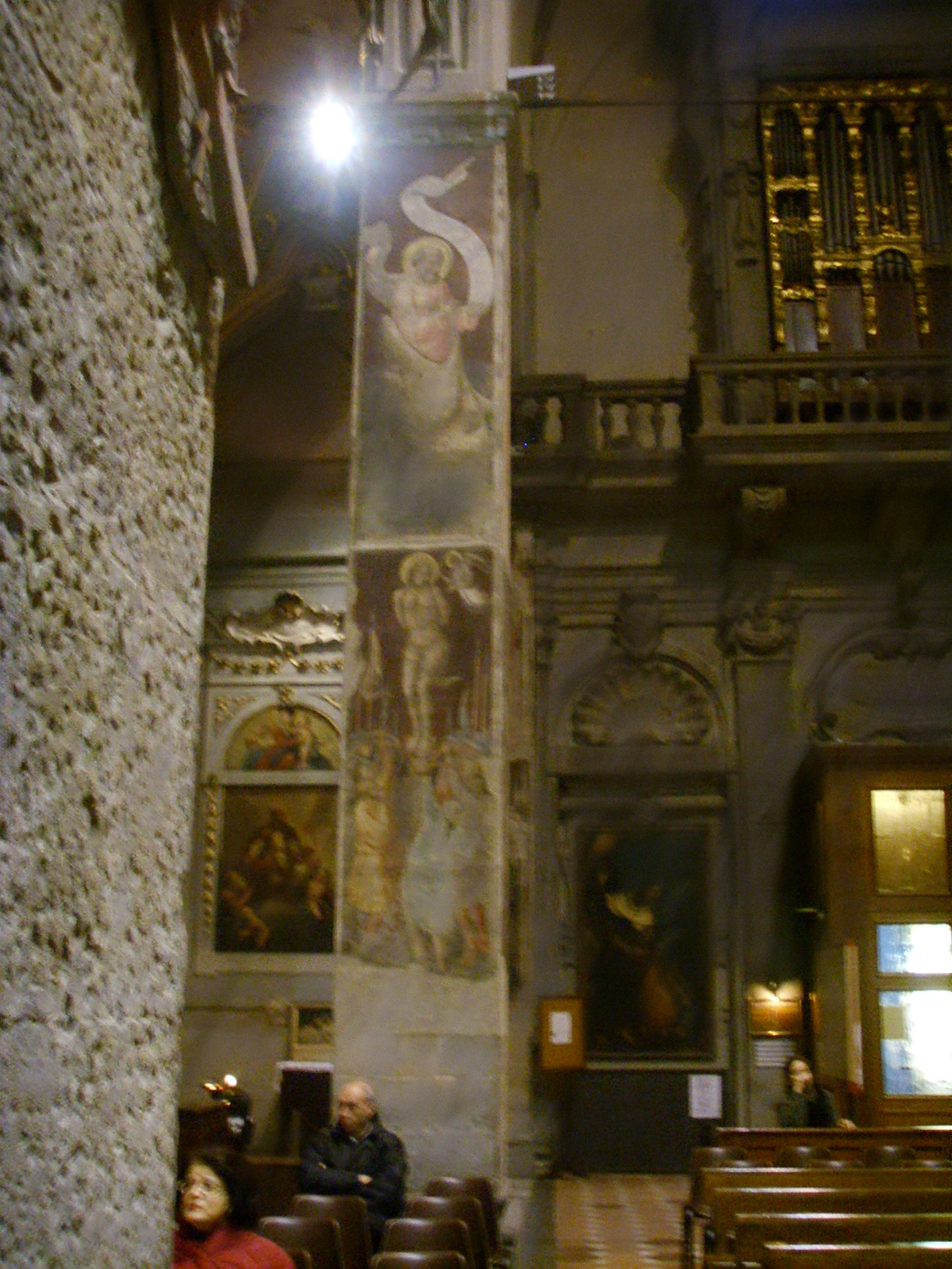 Santa_Maria_Maggiore,_frescos (XIV century) in Florence, Italy